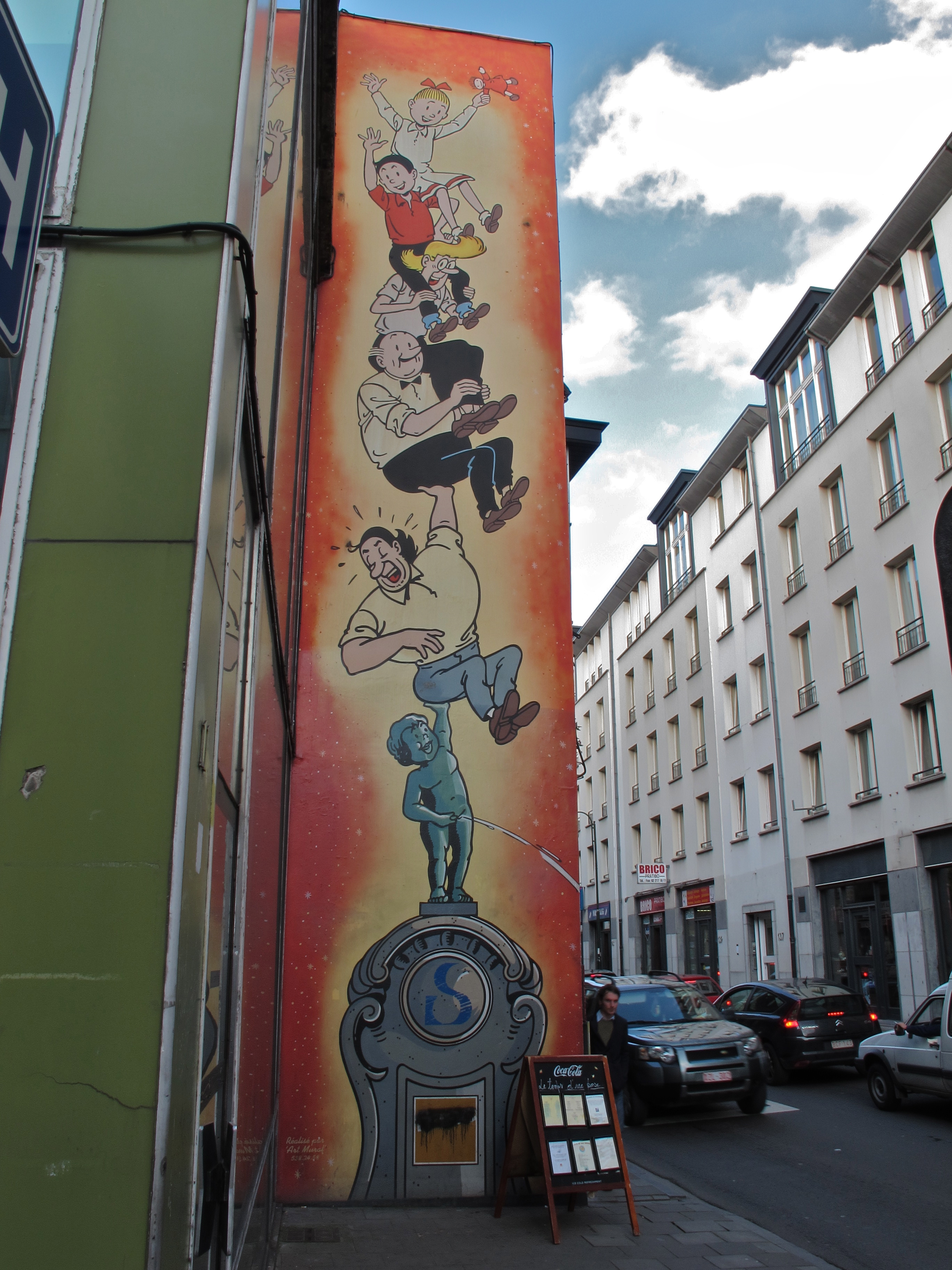 Stripmuur Suske en Wiske te Lakensestraat 116, Brussel.